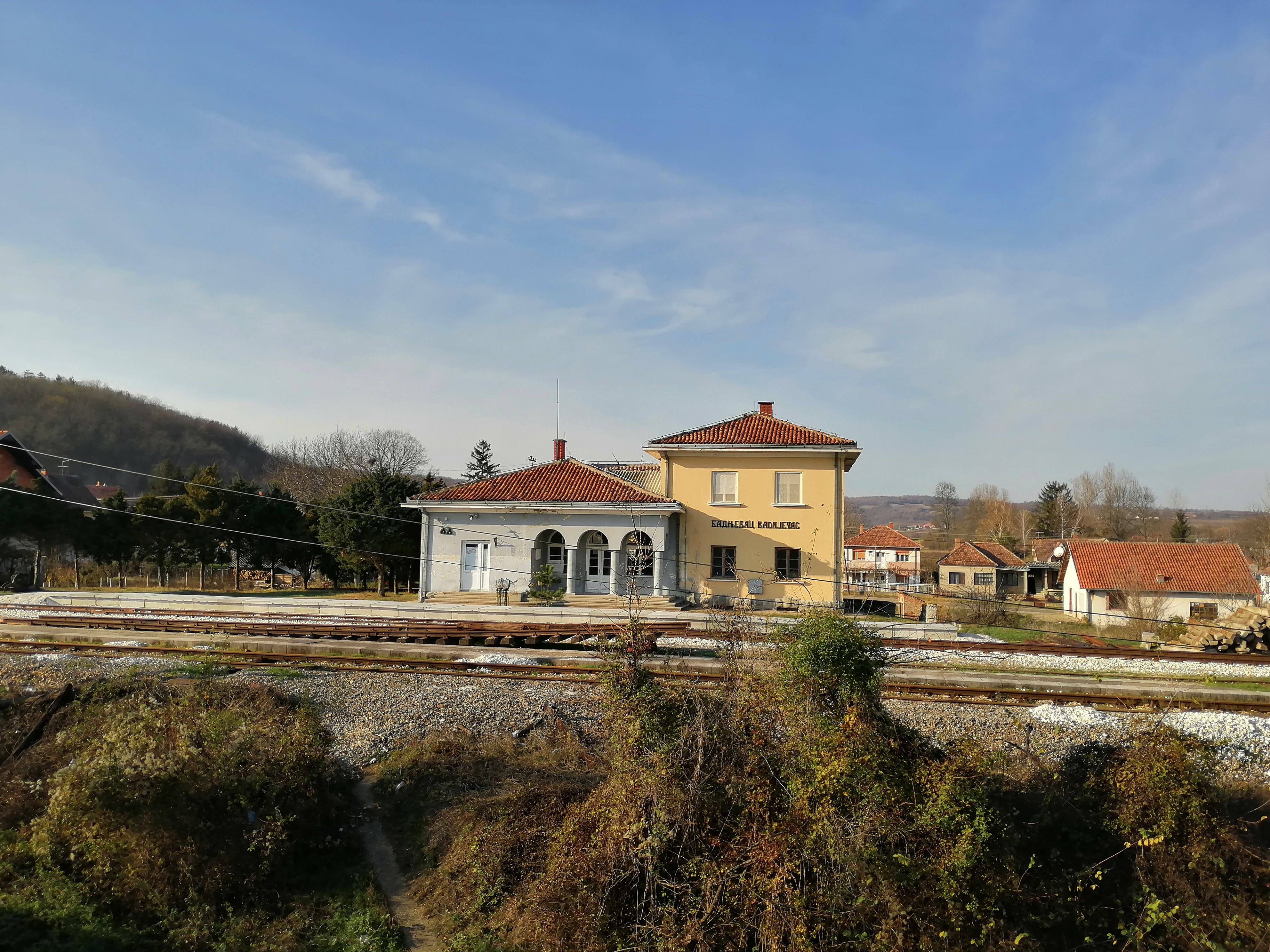 Železnička stanica u Badnjevcu